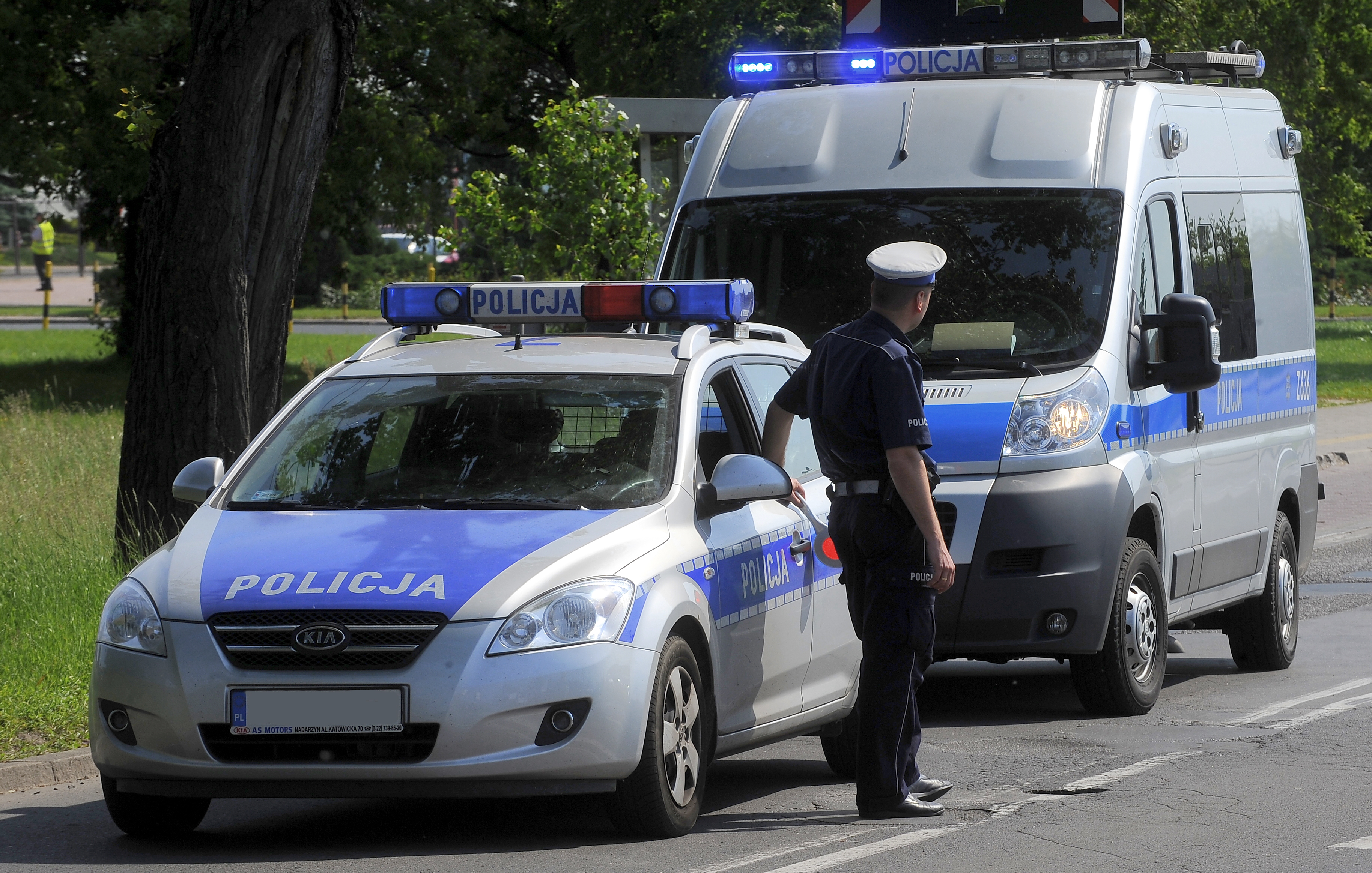 Policyjne radiowozy Kia Cee'd i Fiat Ducato